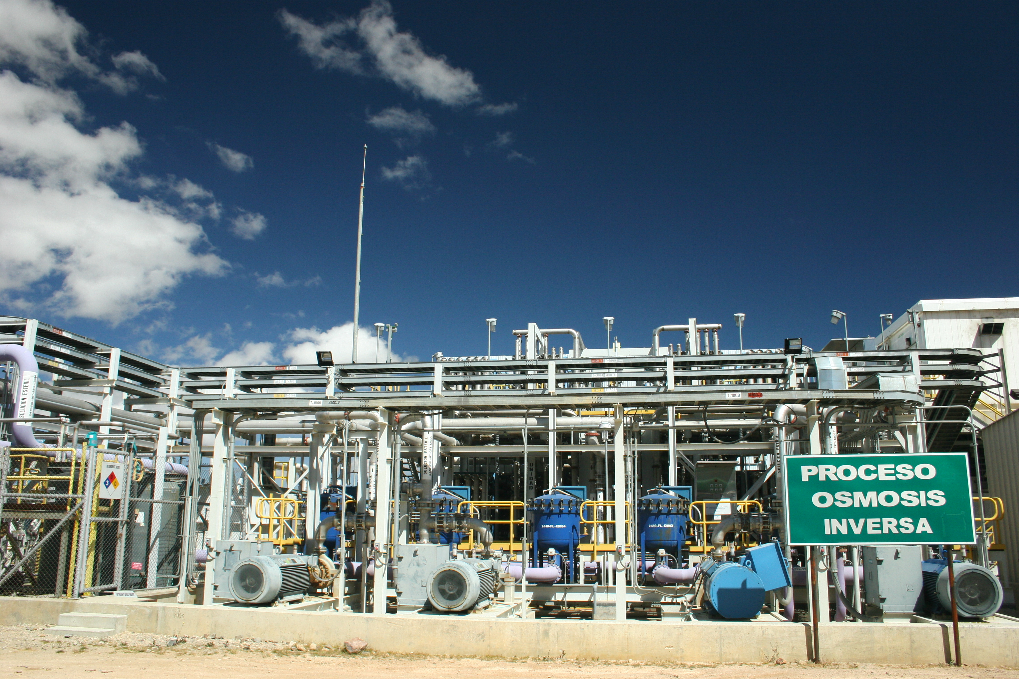 Planta de Tratamiento de Osmosis Inversa